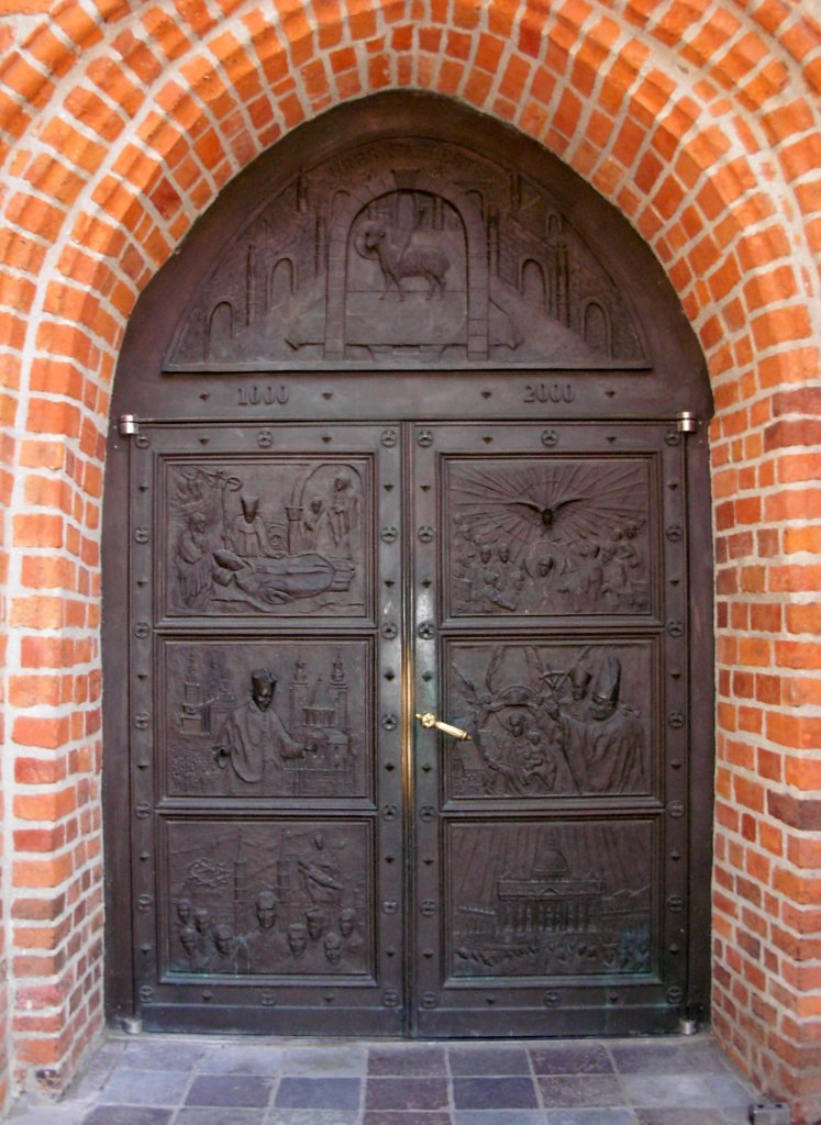 Drzwi jubileuszowe katedry w Bydgoszczy